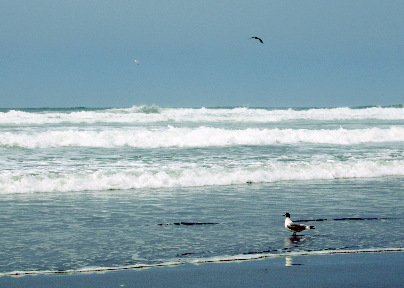 Leucophaeus pipixcan, Playas de la Punta de Bombon, Peru